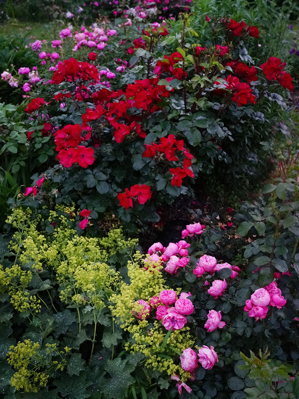 Alchemilla mollis, Rosa 'Leonardo da Vinci', Rosa 'Robusta', Rosa 'Louise Odier'